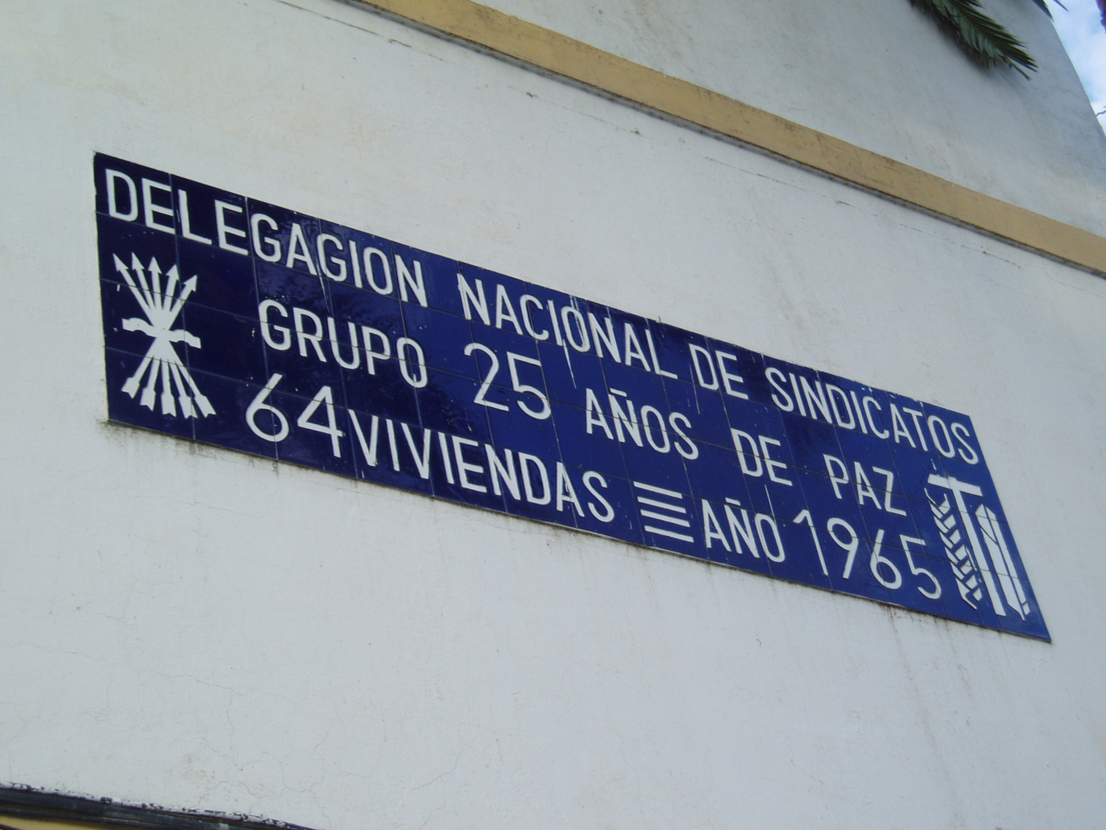 Placa en Estepona (Málaga).